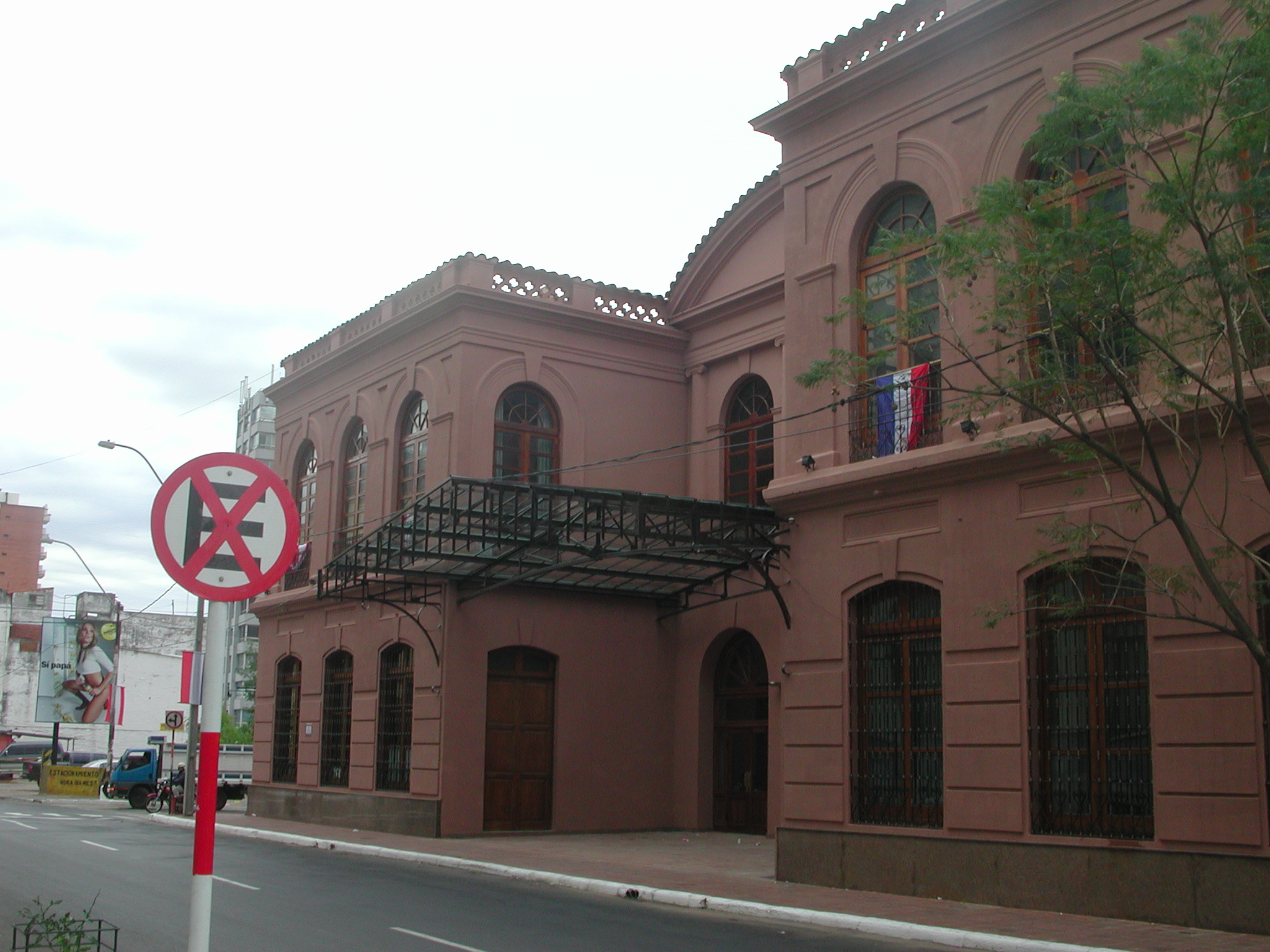 Teatro Municipal Ignacio A. Pane.